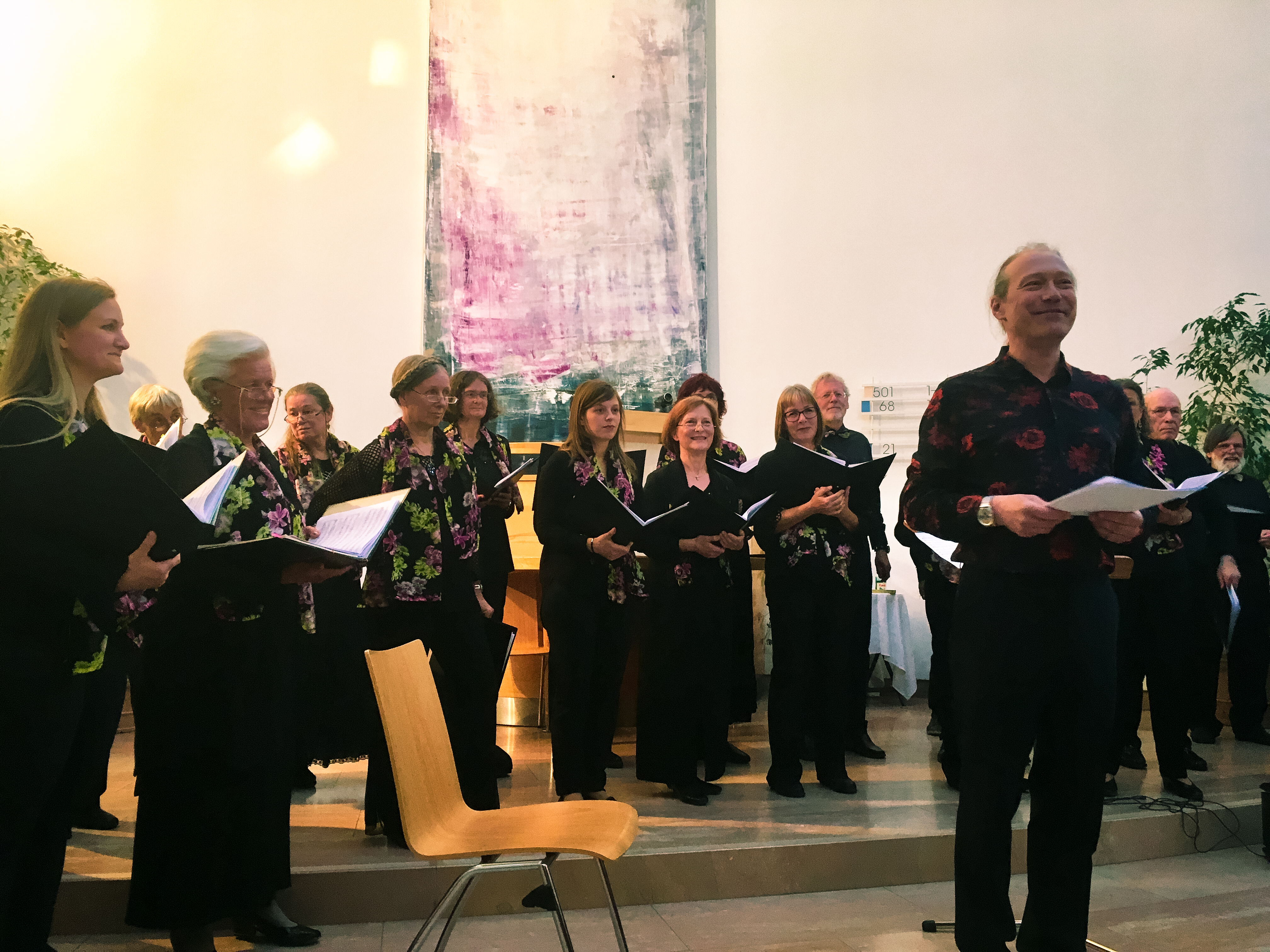 KammerChorus Klosterneuburg 2019 beim 40/30 Jubiläumskonzert in der Evangelischen Kirche Klosterneuburg